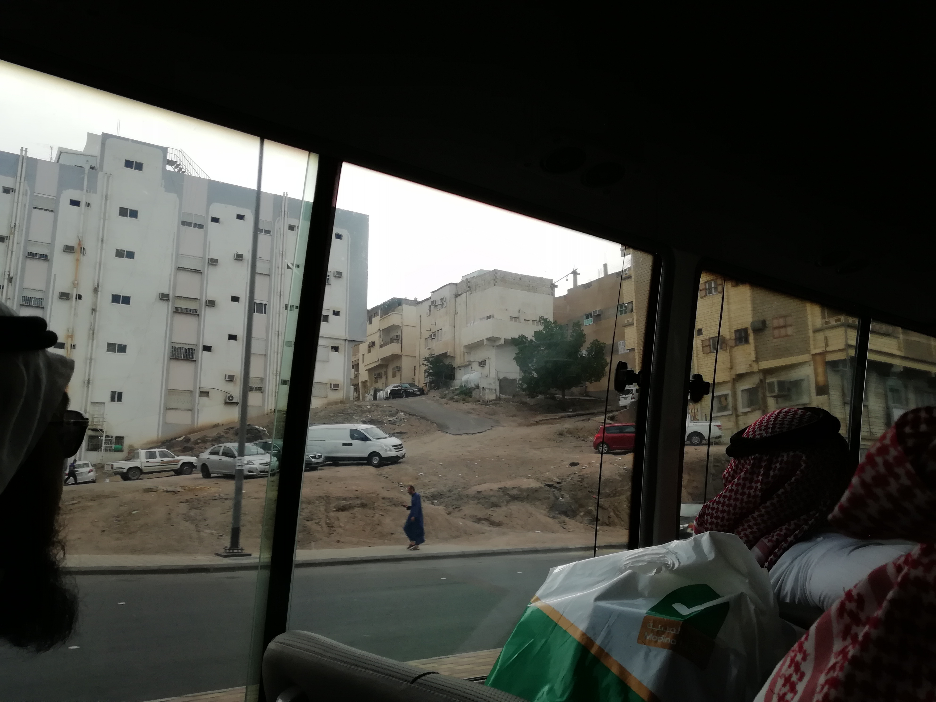 al-Madinah al-Munawarah may be Raya hill Mosque